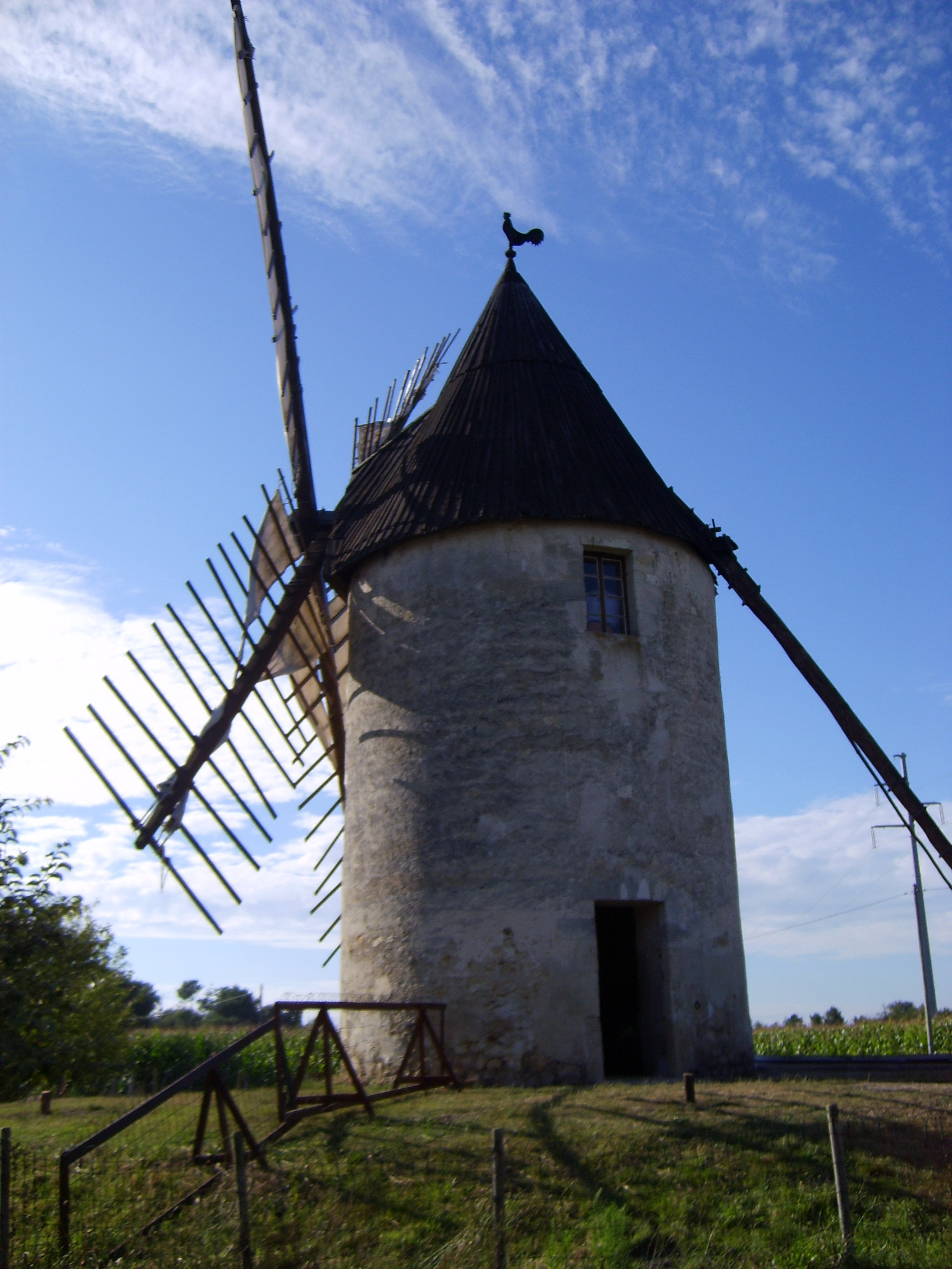 Moulin à vent de Vensac (Gironde, France)